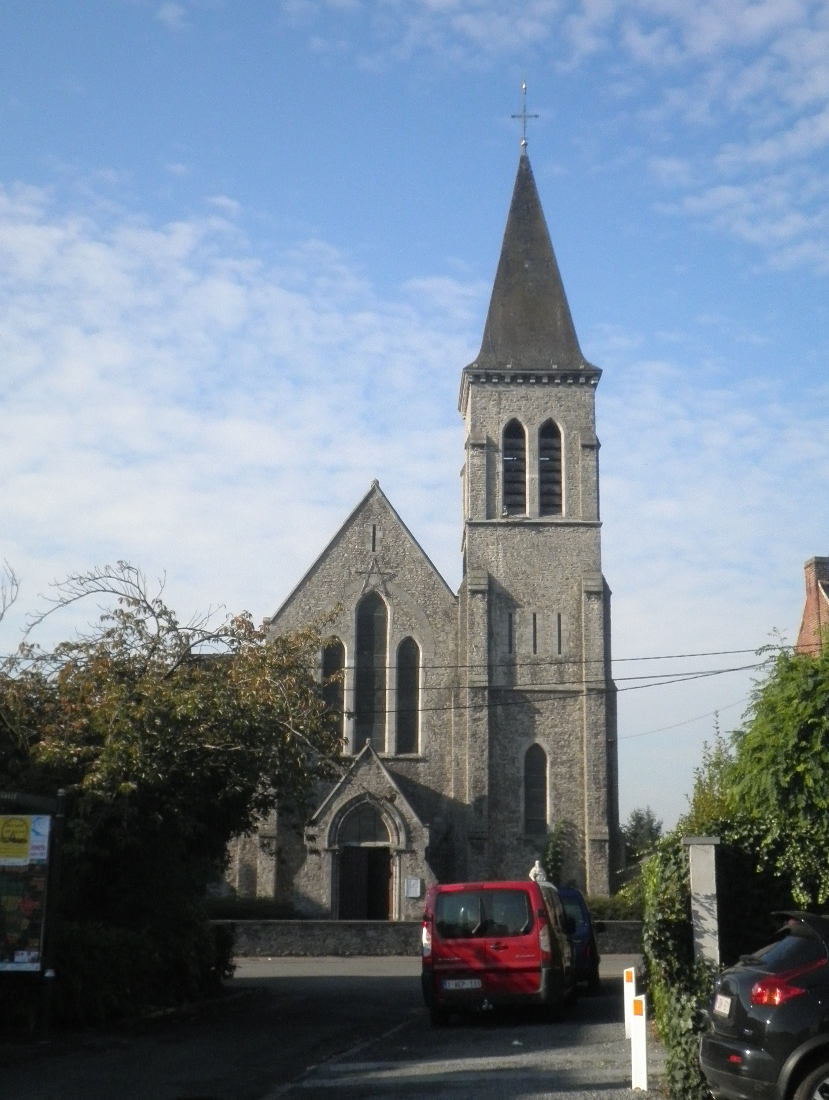 Église Notre-Dame de la Tombe, à Kain-la-Tombe, Kain (Tournai)